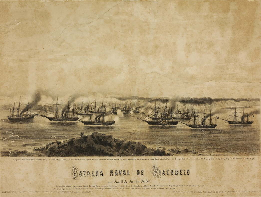 Gravura mostrando um aspecto da Batalha Naval do Riachuelo ocorrida no rio da Prata, na Argentina. Legenda original: A canhoneira Mearim (Commandante Elisiario Barboza) dando socorro ao Parnahyba 10 minutos depois de abordada (2 1/2 horas da tarde). Os três vapores largarão apressadamente a sua preza, não só por soffrerem um fogo vivisimo do Mearim, como por verem a approximação immediata da Esquadra Brasileira, que déra uma volta rápida e subia novamente a toda força.